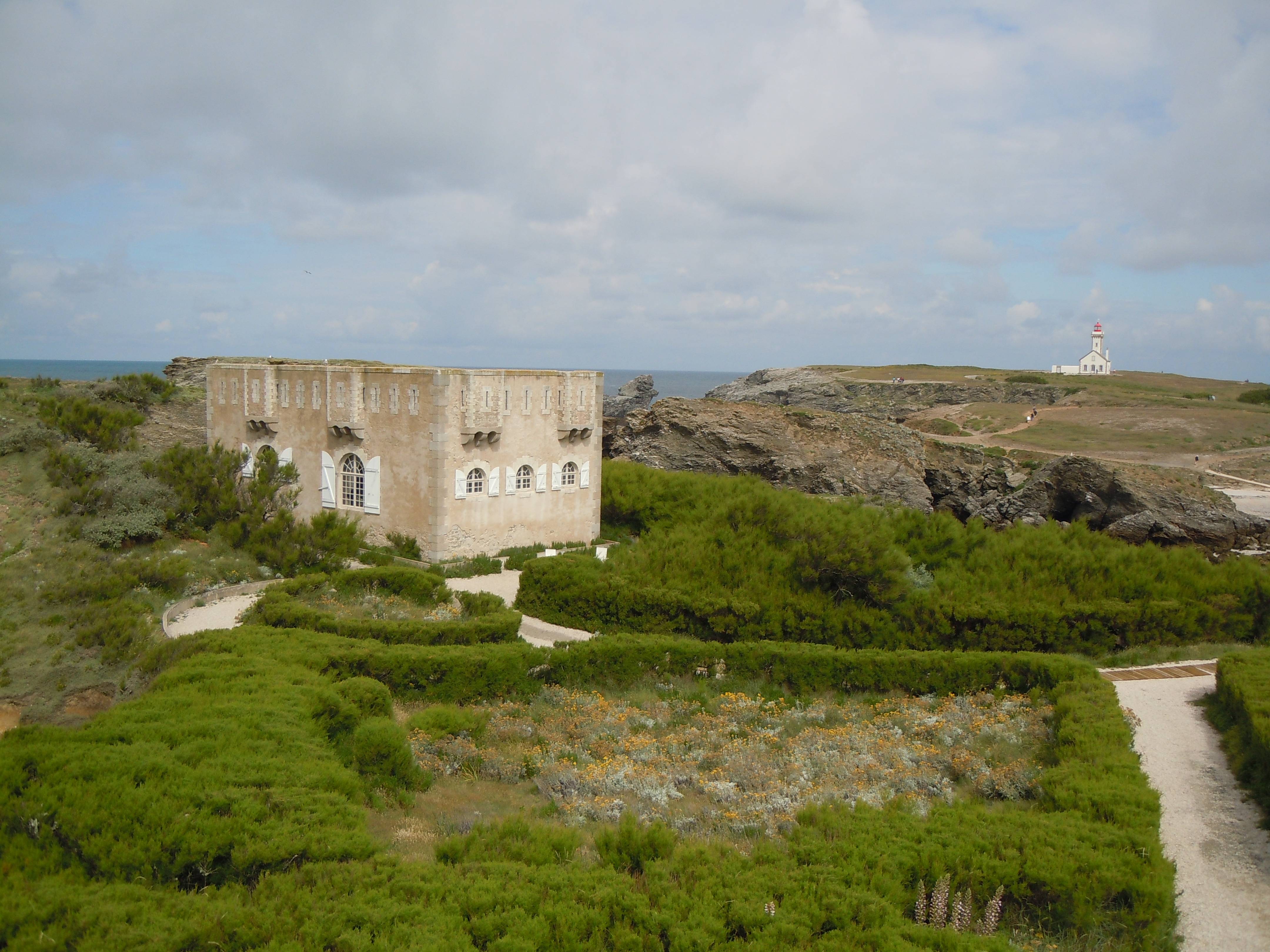 Fort de Sarah Bernard à Belle-Ile en été En hiver